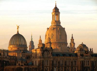 eine der wohl schönsten Städte in Europa mit jahrhundertalten Bauten und einer Mischung aus Geschichte und Moderne, die ihresgleichen sucht ..... Dresden